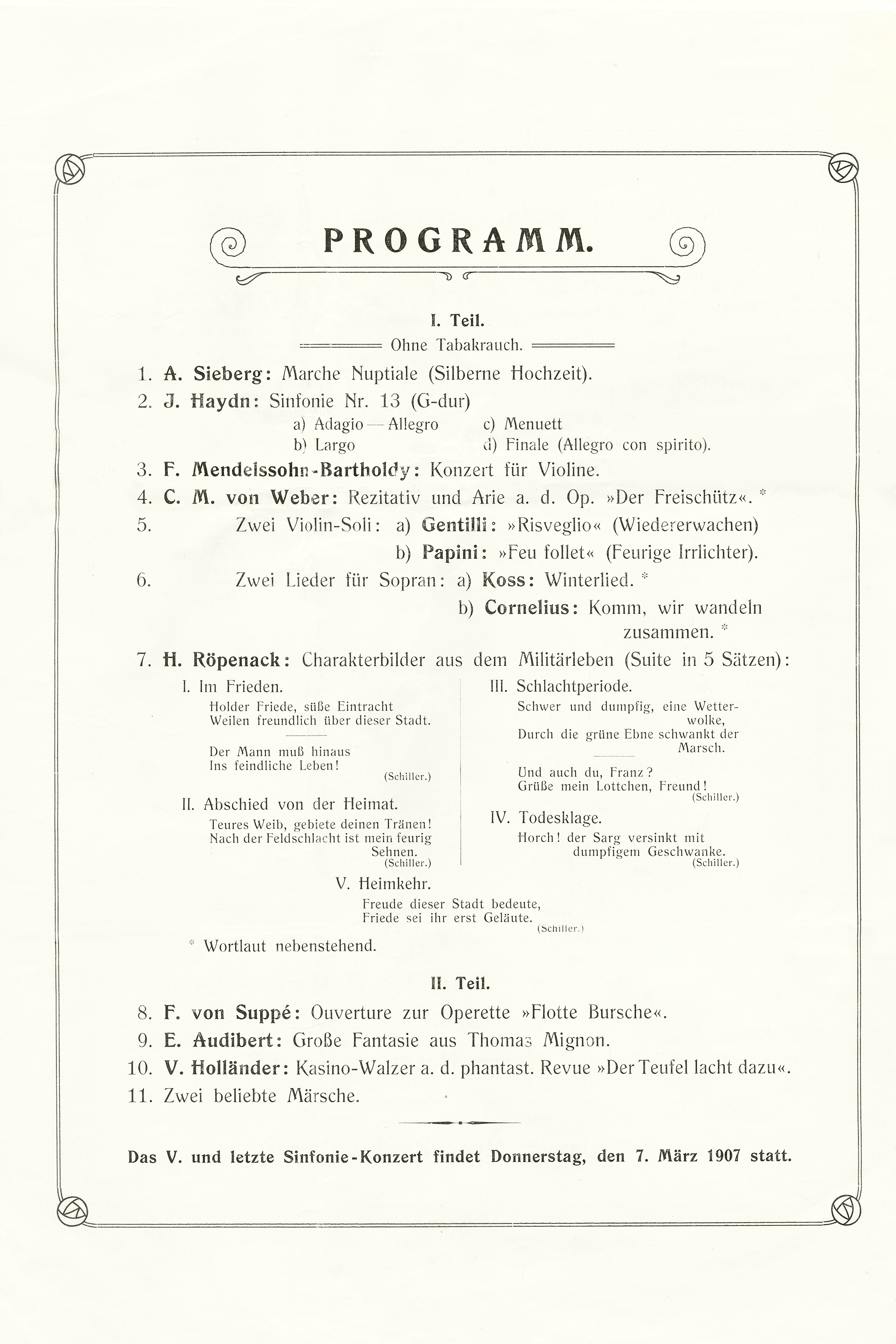 Heinrich Christoph Röpenack, Konzertprogramm, 1907